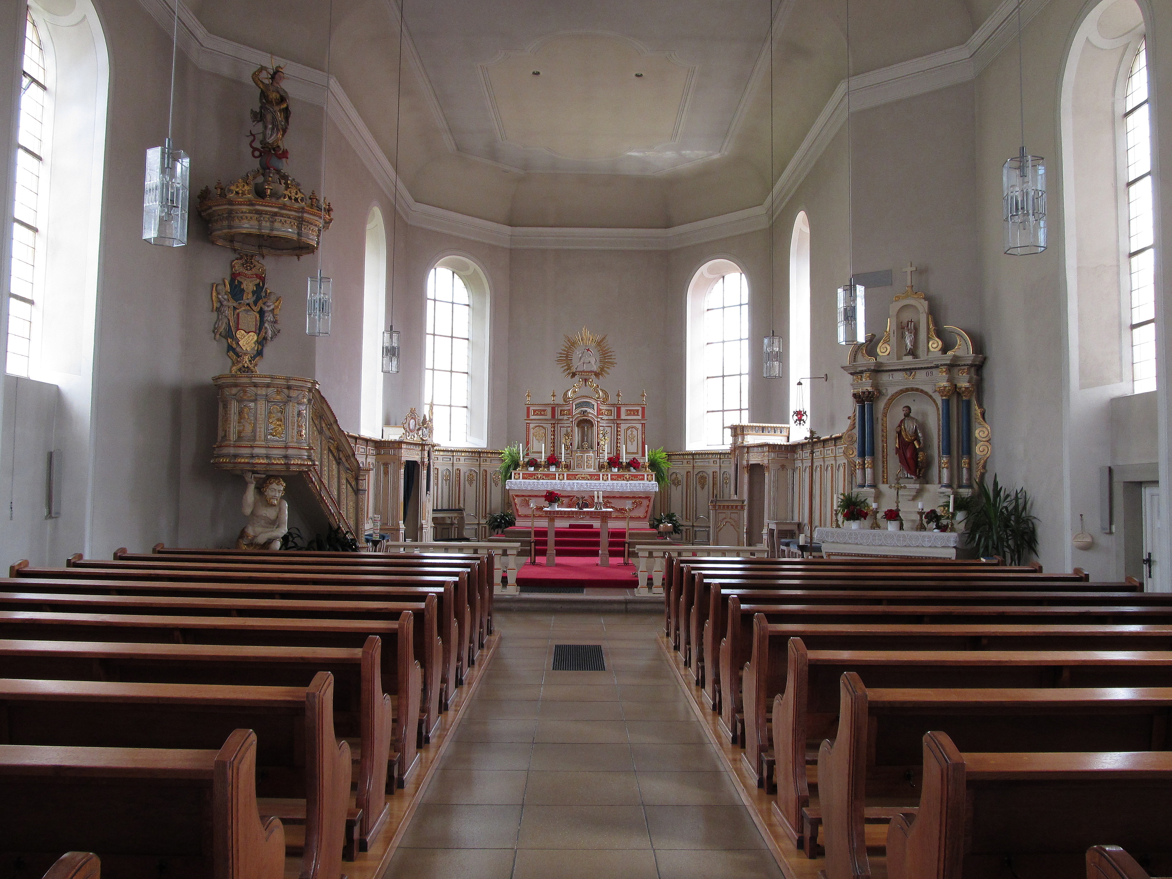 Blick ins Innere der katholischen Pfarrkirche St. Markus in Reinheim, Gemeinde Gersheim, Saarland